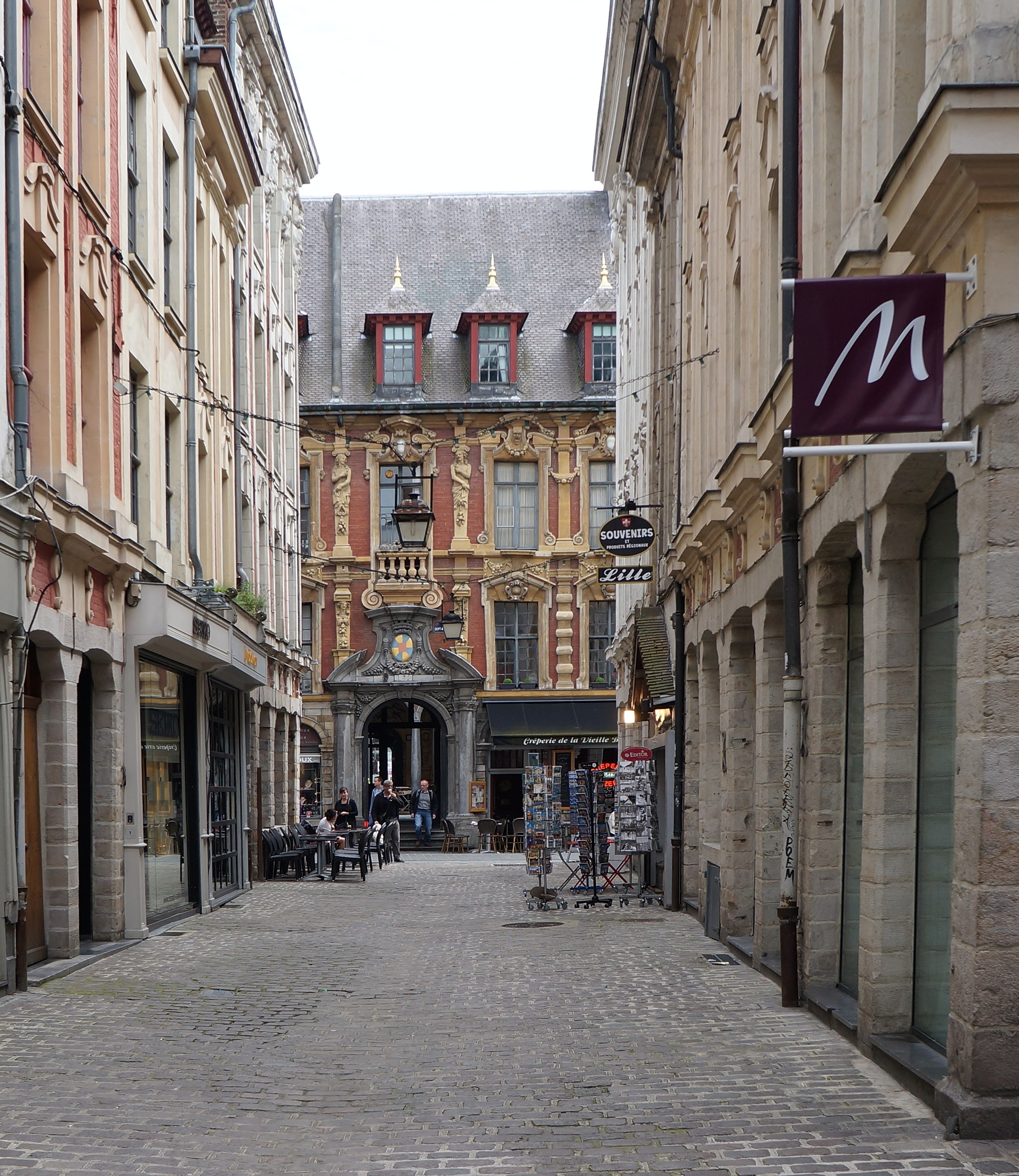 La porte de la Vieille Bourse rue des 7 Agaches à Lille Nord (département français) .